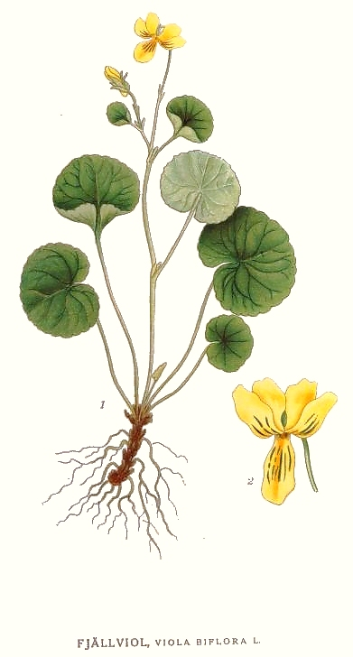 Original Description Fjällviol, Viola biflora L.